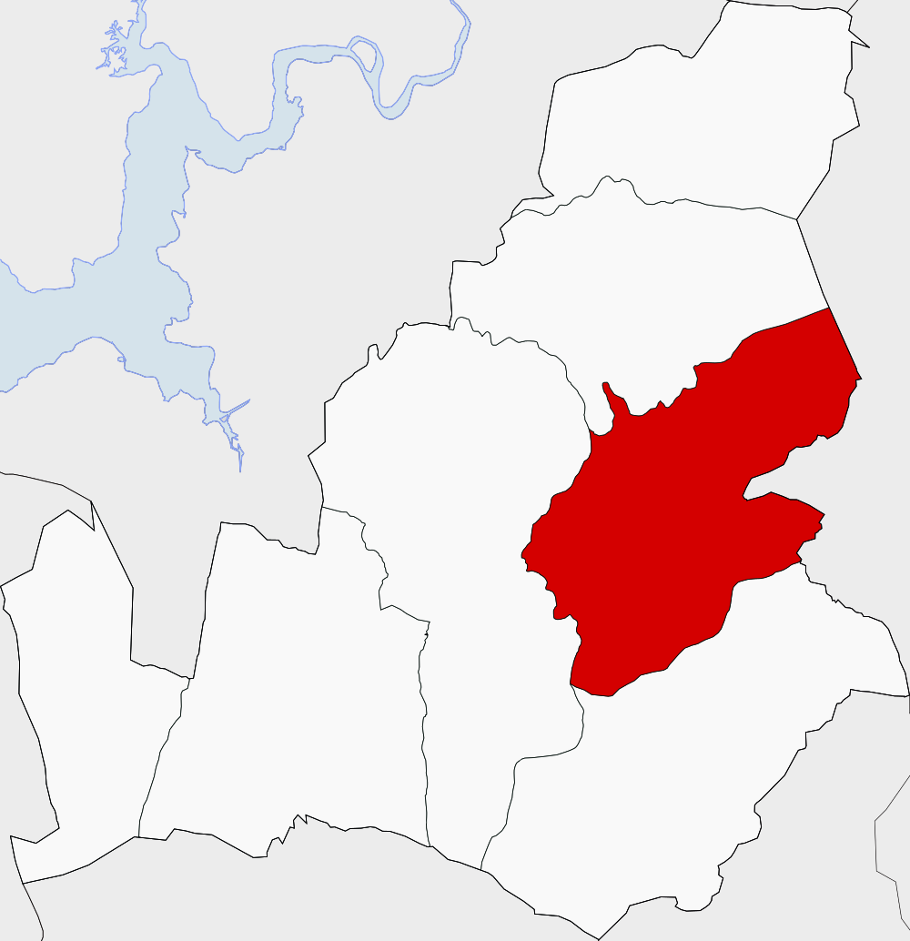 Extensión de la parroquia de Vilacova en Lousame